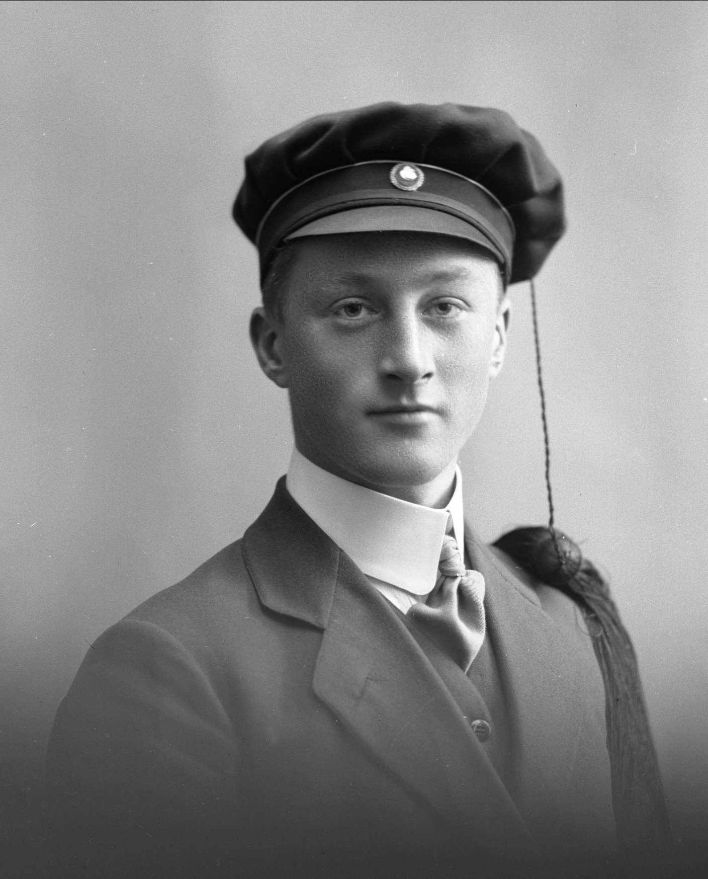 Portrett av illustratøren og kunstneren Otto von Hanno som ung student i 1910. Bildet tilhører Norsk Folkemuseum.